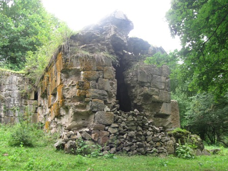 Մաթոսավանք, 2013 թ.-ի օգոստոս